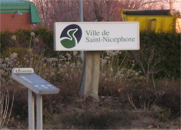 Panneau de la ville de Saint-Nicéphore dans le parc Roger Traversy